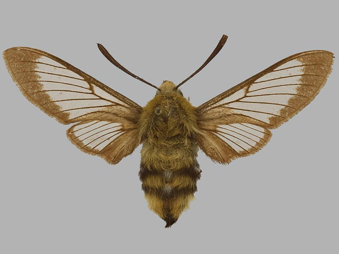 Hemaris alaiana самка